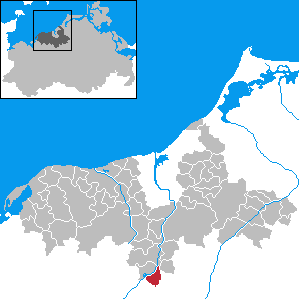 Kassow in Mecklenburg-Western Pomerania - District Bad Doberan